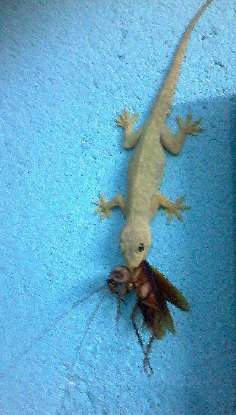 টিকটিকির শিকার